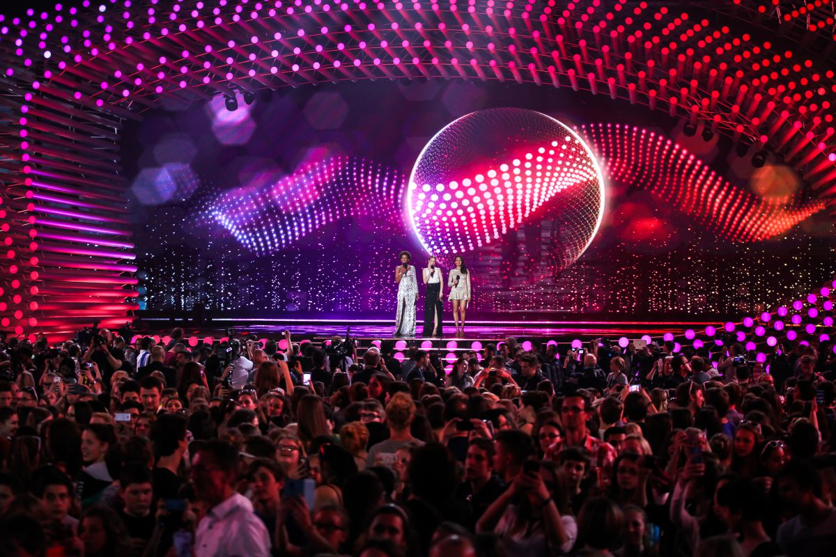 Сцена Евровидения 2015. 2 полуфинал